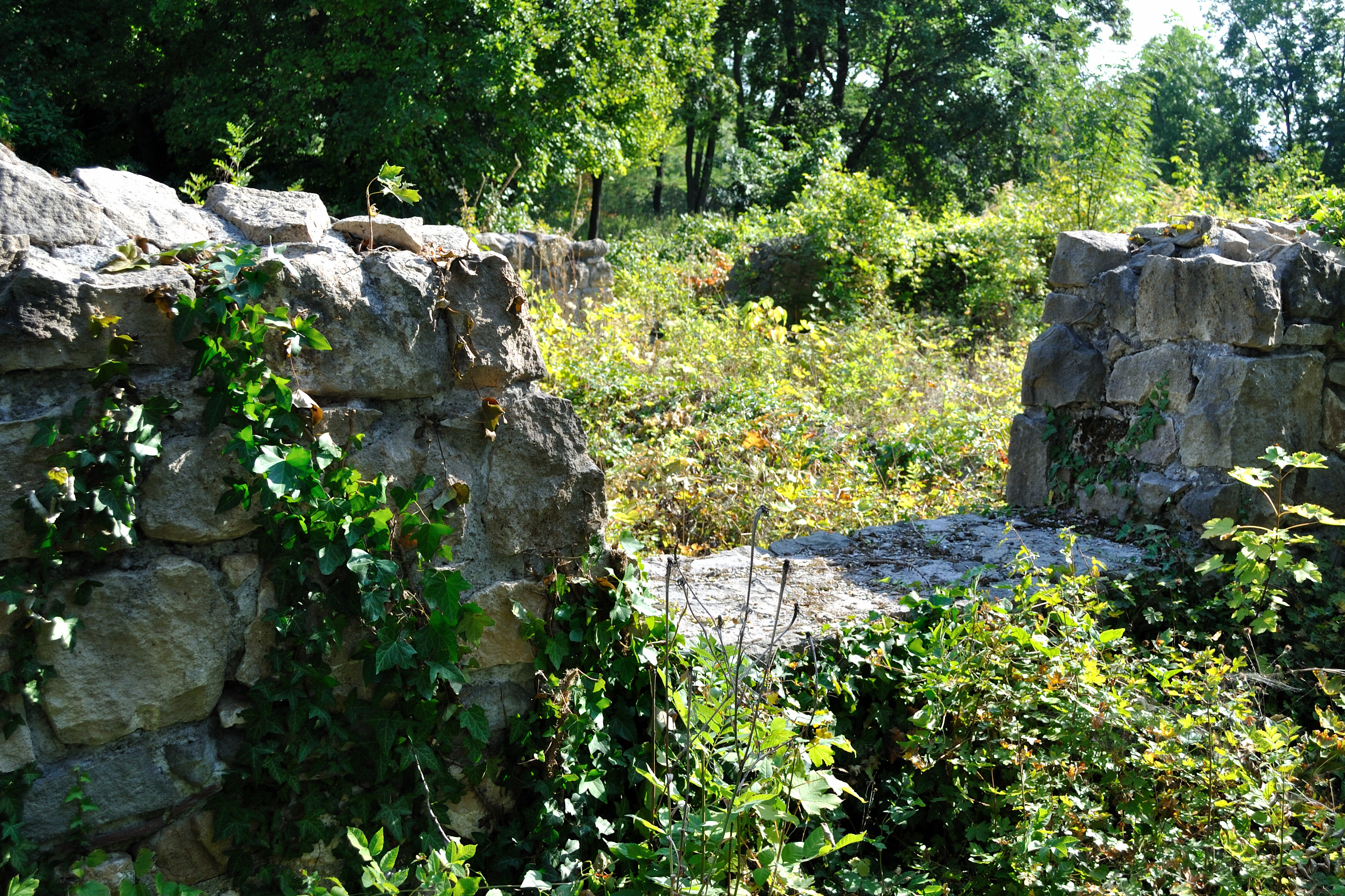 Mátyás király nyéki vadászkastélyának romjai (Budapest 2, Hűvösvölgyi út 78., Fekete István utca 1-3.) This is a photo of a monument in Hungary. Identifier: 273